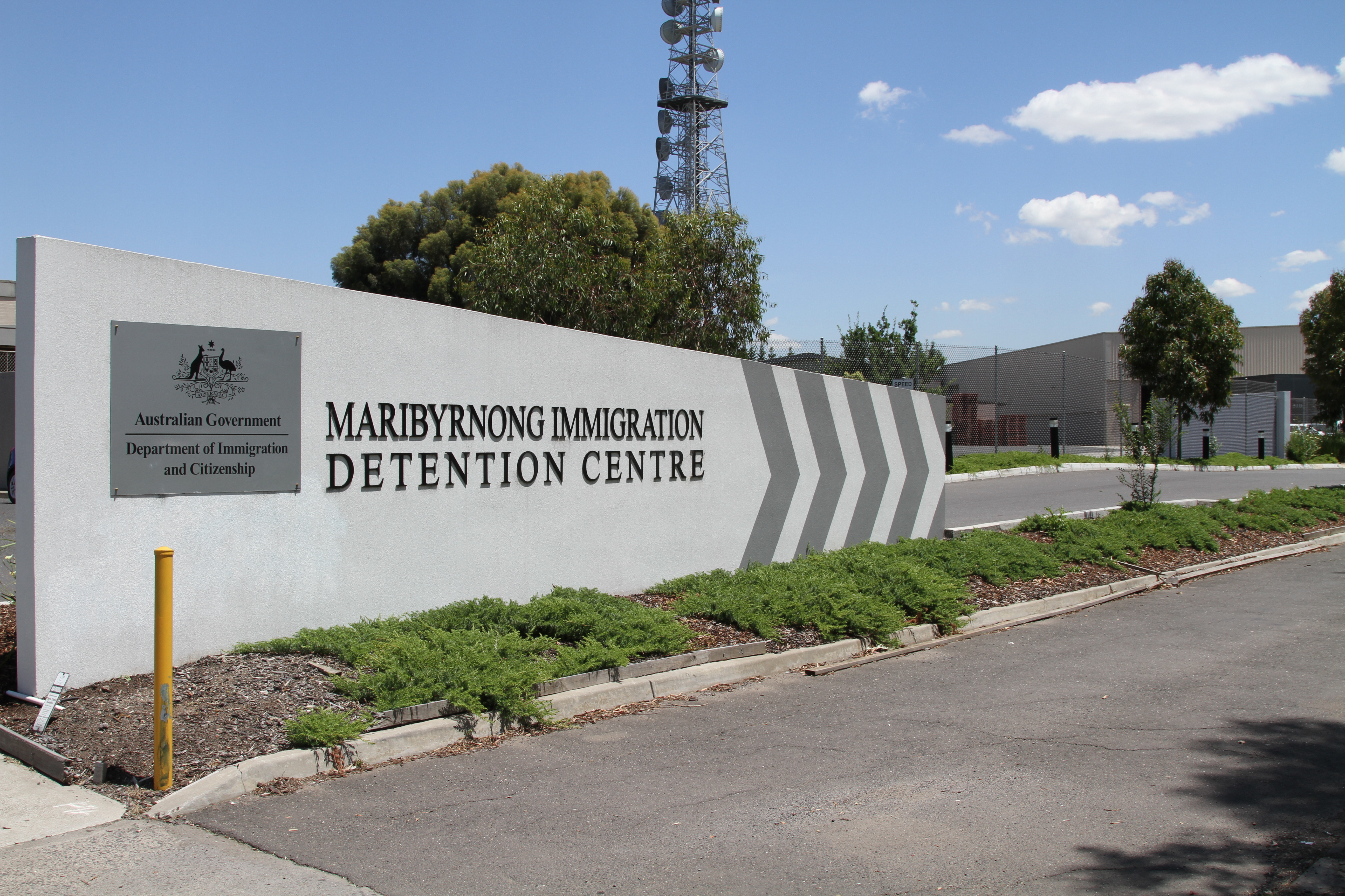 Maribynong IDC